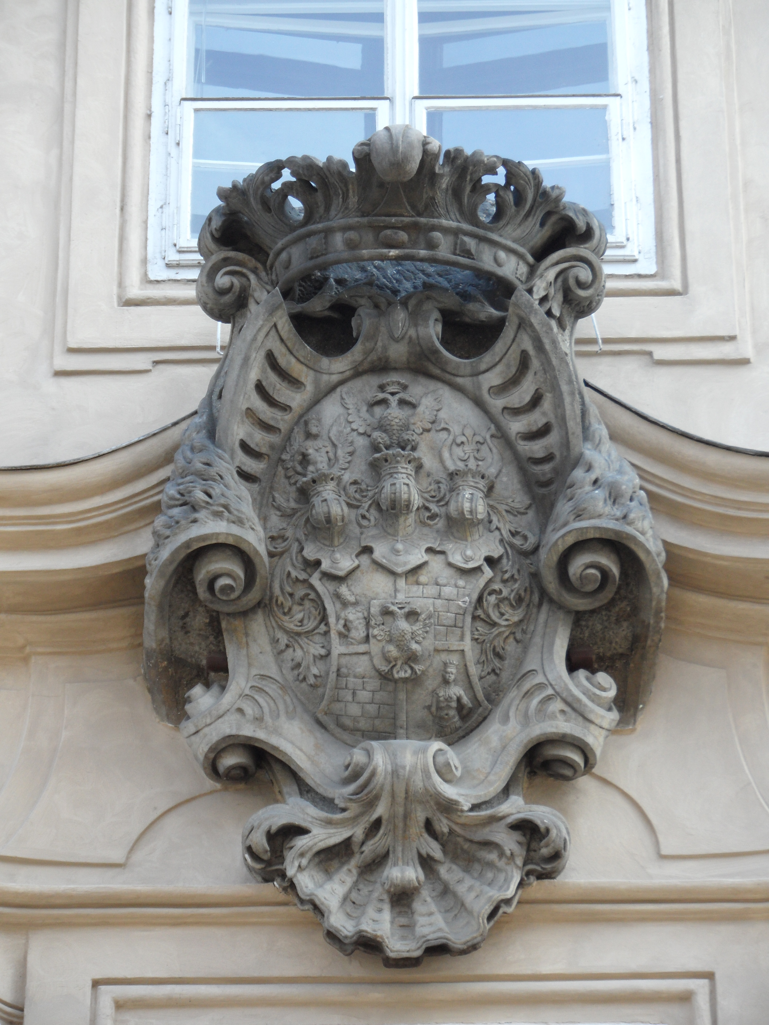 Erb Morzinů, průčelí Morzinského paláce, Praha - Ferdinand Maxmilián Brokoff